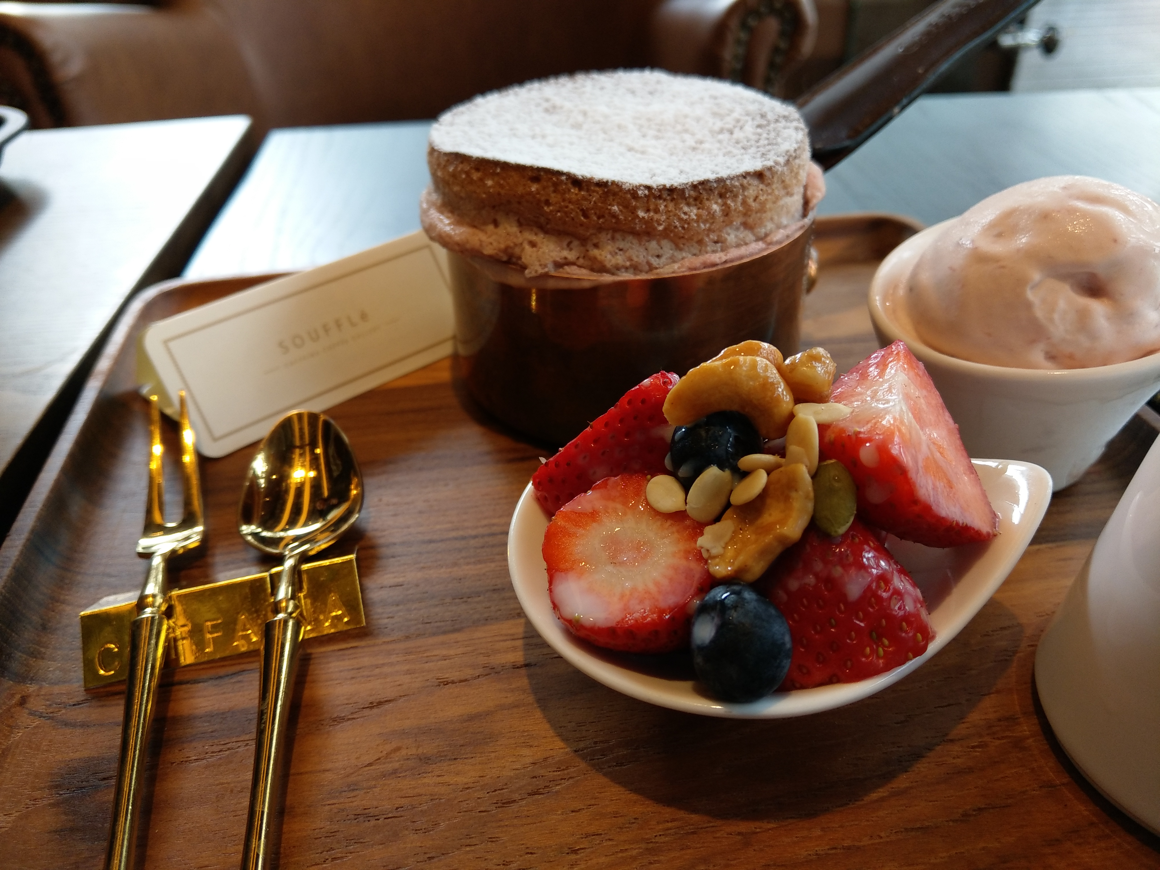 一份佐以莓果的舒芙蕾